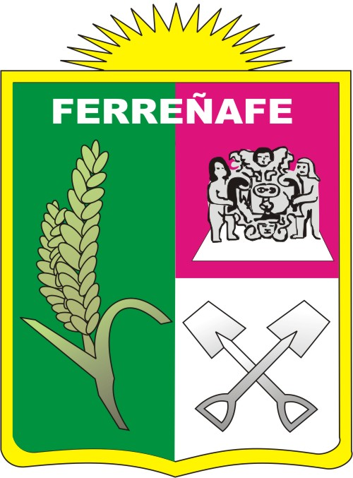 Escudo de la provincia de Ferreñafe